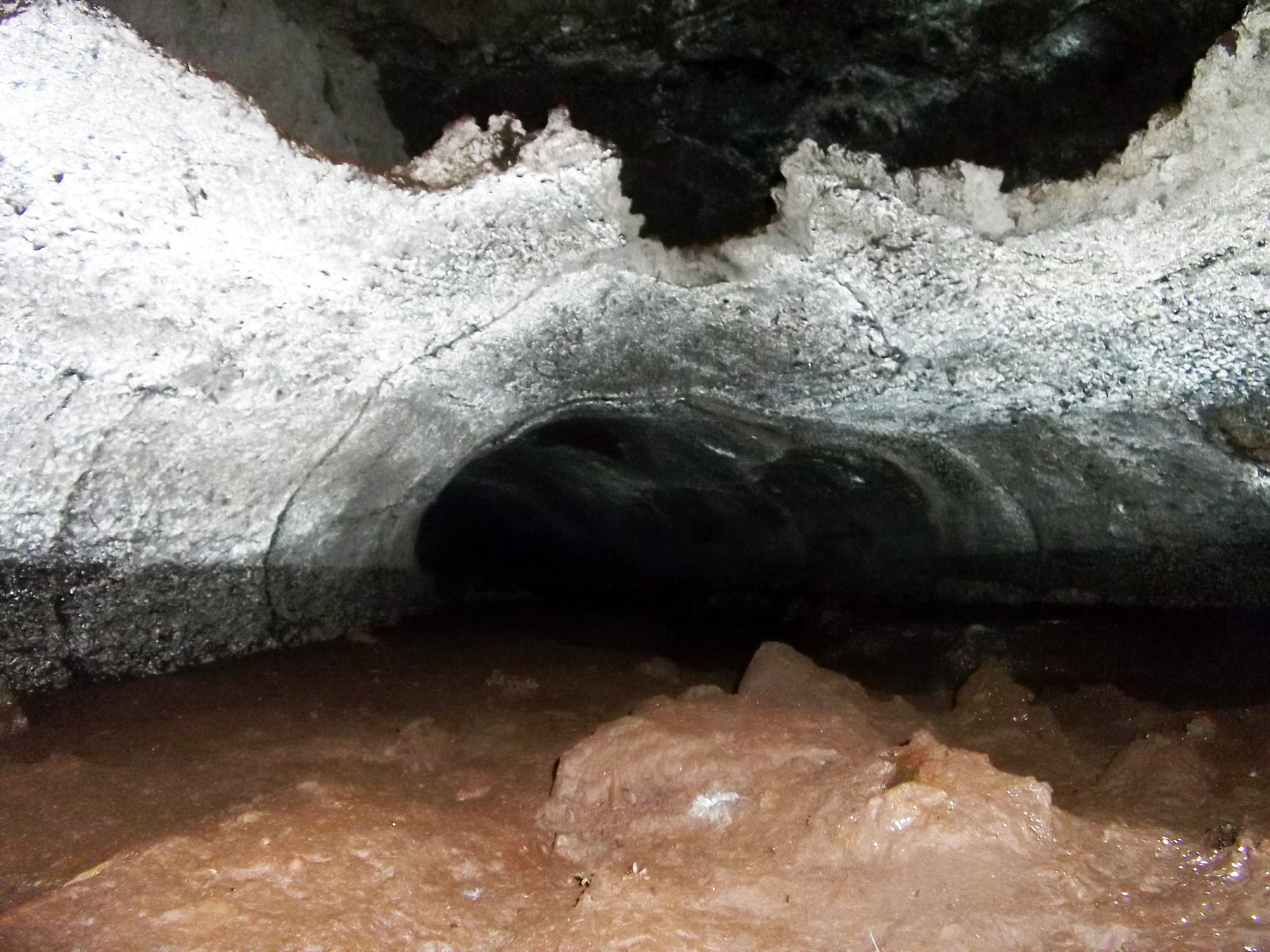 Gruta dos Balcões, formações geológicas, Biscoitos, Praia da Vitória, Terceria, Açores